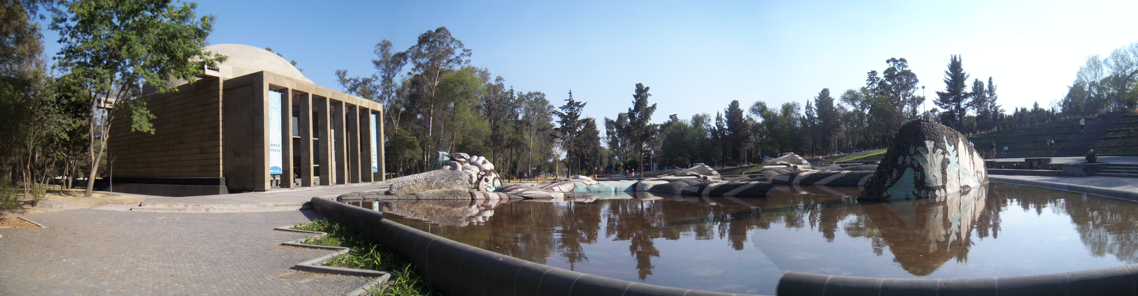 Panorámica del Cárcamo de Dolores y Fuente de Tláloc, Chapultepec, Ciudad de México.